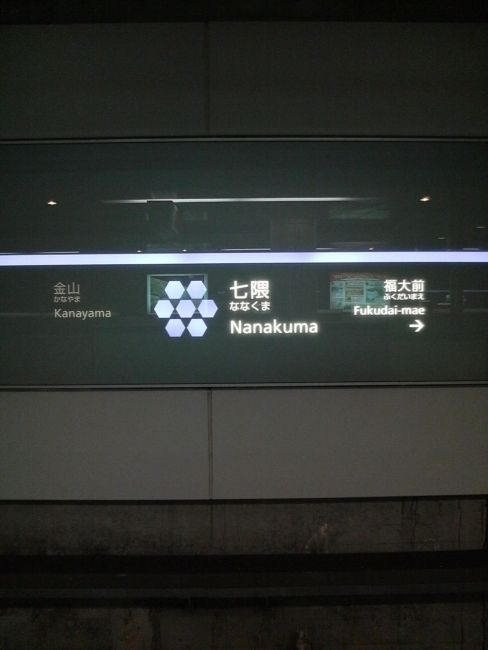 福岡市地下鉄七隈線七隈駅の駅名標